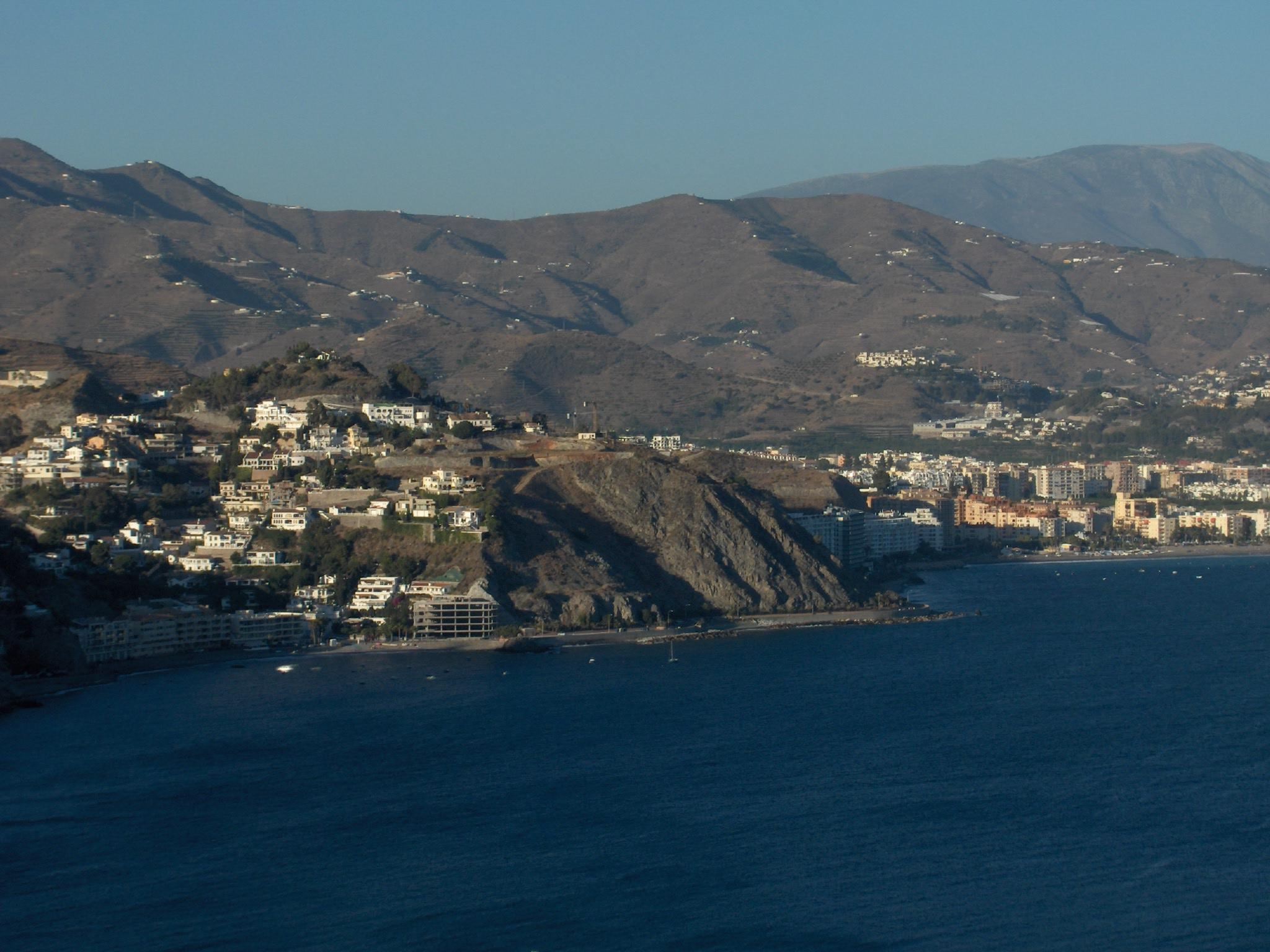 Vista lejana de Cotobro, en Almuñécar.